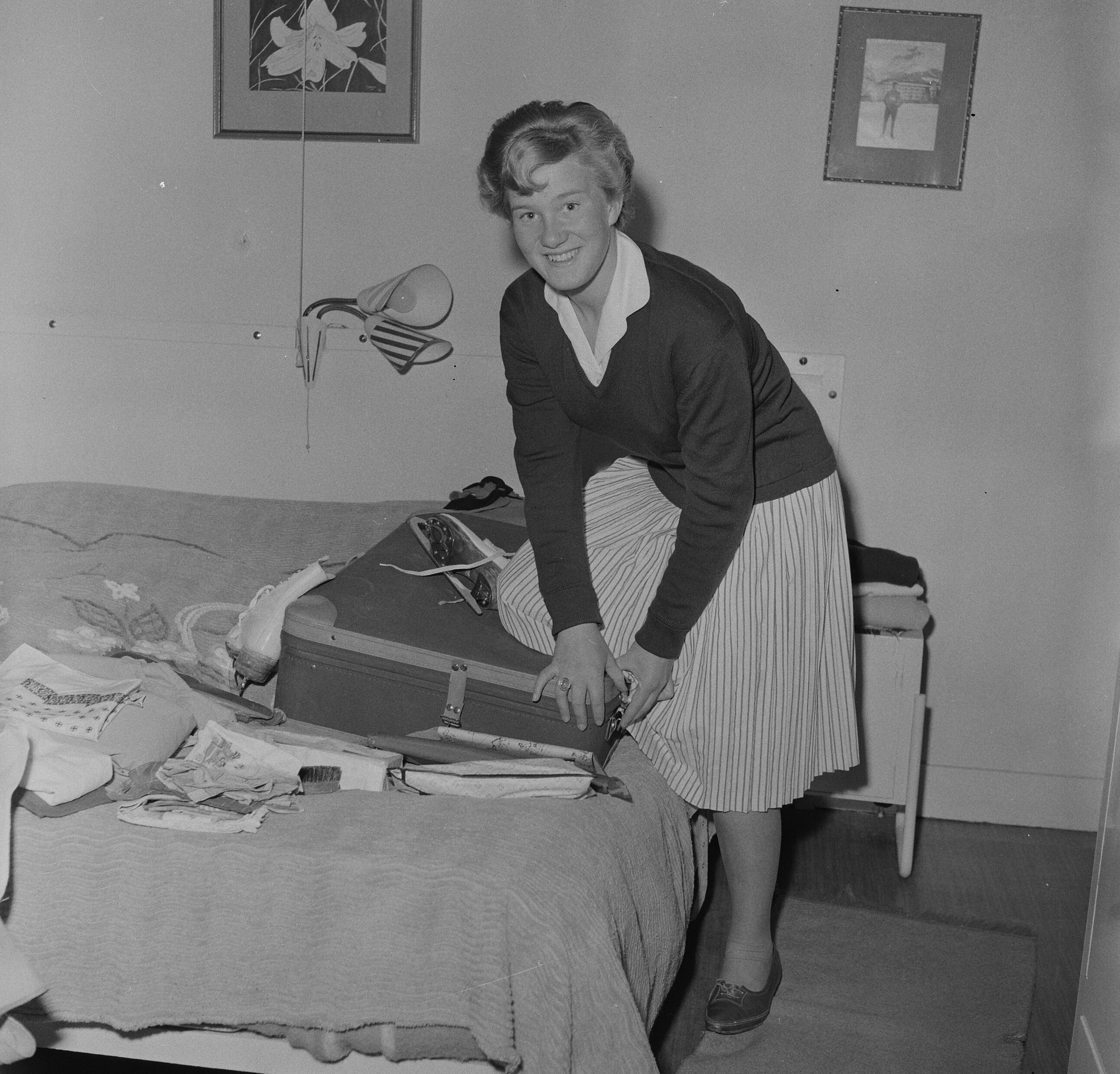 Collectie / Archief : Fotocollectie Anefo Reportage / Serie : [ onbekend ] Beschrijving : Sjoukje Dijkstra een dag thuis na de Europese Kampioenschappen in Garmisch, Sjoukje tijdens het inpakke Datum : 9 februari 1960 Locatie : Garmisch Trefwoorden : KAMPIOENSCHAPPEN Persoonsnaam : Dijkstra, Sjoukje Fotograaf : Behrens, Herbert / Anefo Auteursrechthebbende : Nationaal Archief Materiaalsoort : Negatief (zwart/wit) Nummer archiefinventaris : bekijk toegang 2.24.01.03 Bestanddeelnummer : 911-0154 Reacties Geplaatst door Sportliefhebber op 25 juli 2017 - 19:53. Locatie: Amsterdamseweg Plaats: Amstelveen, Noord-Holland